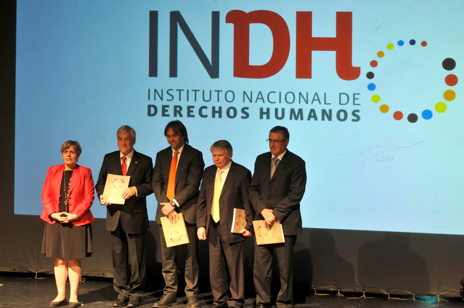 Sebastián Piñera recibe Informe Anual de Derechos Humanos.